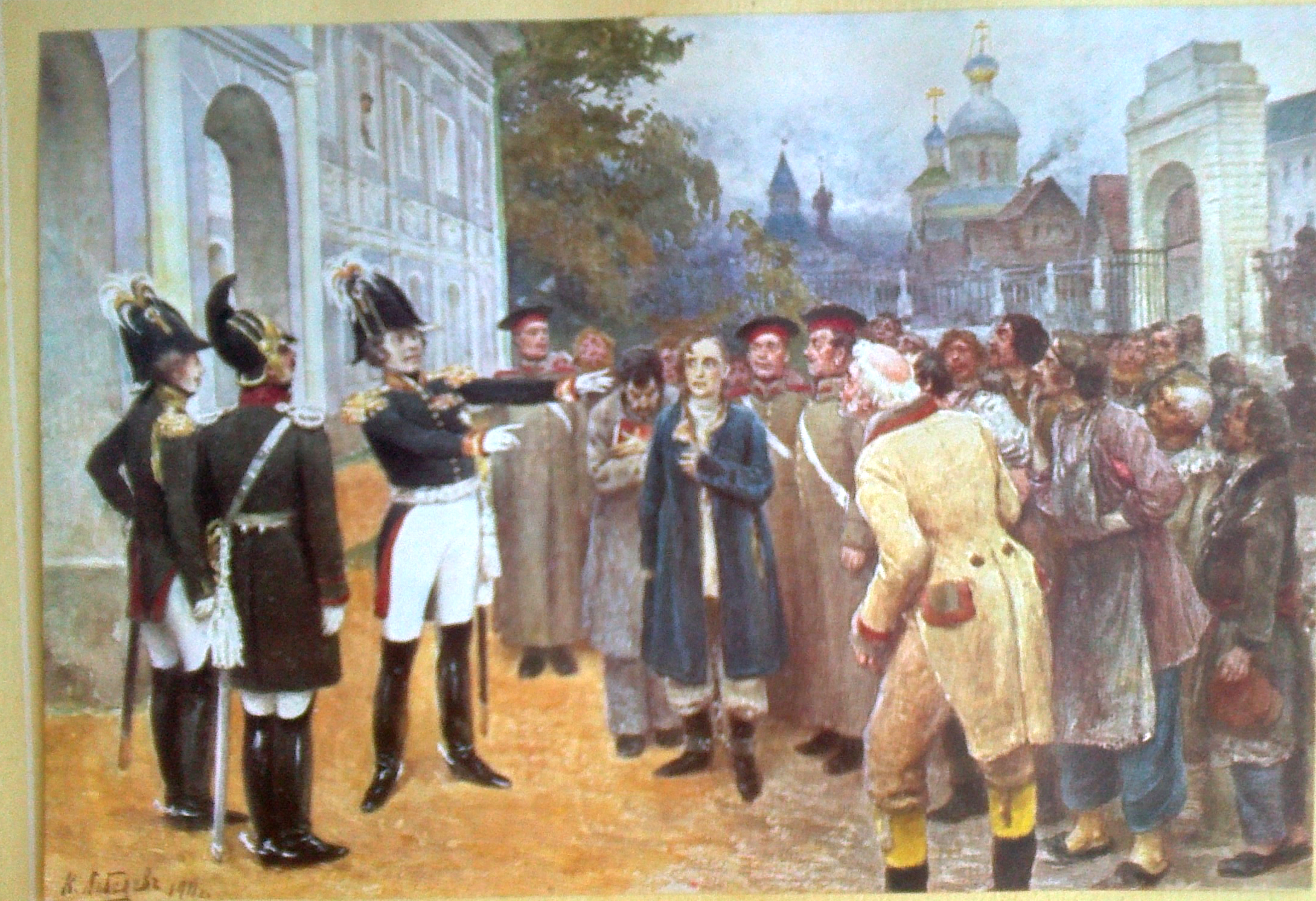 Репродукция картины "Смерть Верещагина", написанная специально для издания "Отечественная война 1812 года и русское общество" том 7